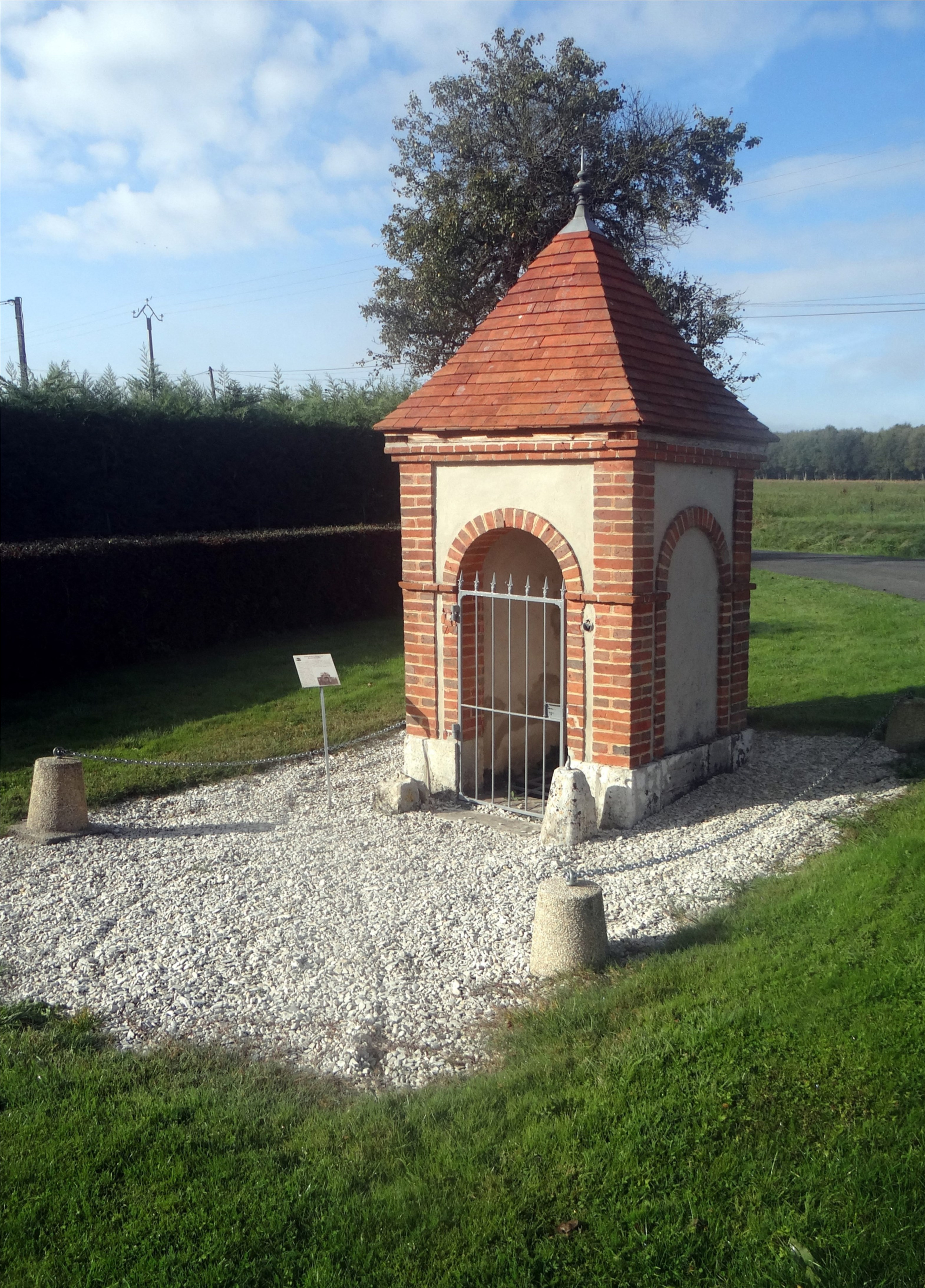 L'oratoire-fontaine Saint-Genou, Noyers, Loiret, France.